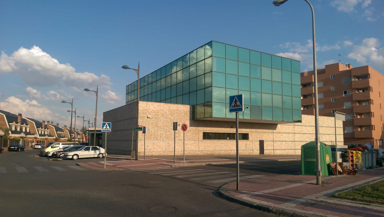 Fachada acristalada teatro Dulce chacón de Parla, lleva el nombre de la escritora y poeta Española en homenaje